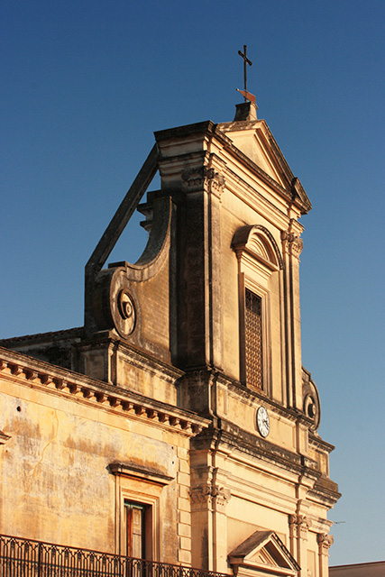 Macchia, frazione di Giarre: la Chiesa Madre intitolata alla Madonna della Provvidenza,.